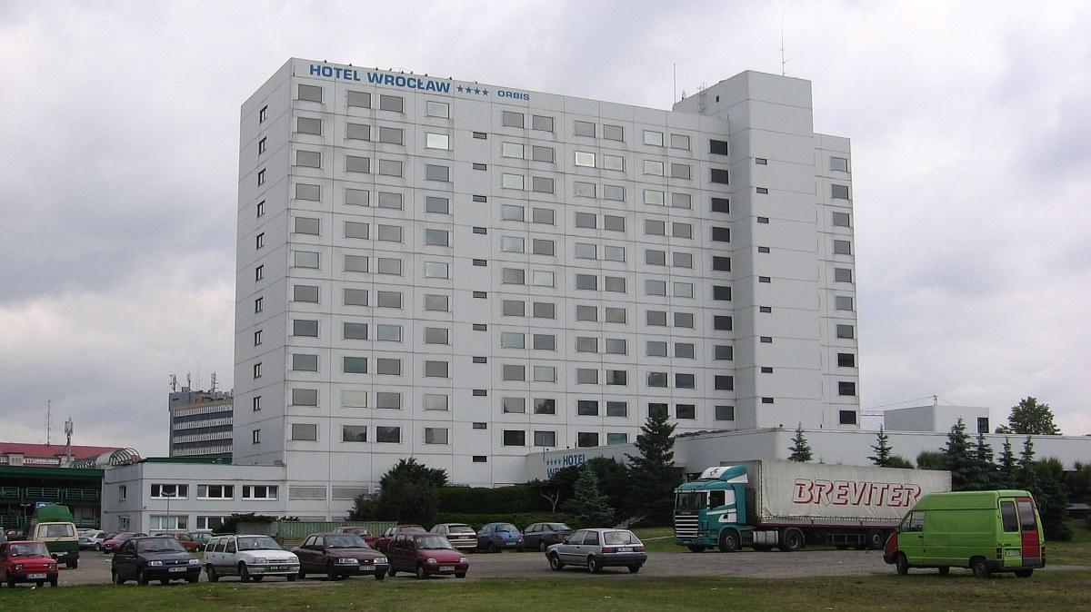 Hotel widziany od strony południowej. Rok 2006, nie widać jeszcze ani "Globisa", a ni "Arkad".